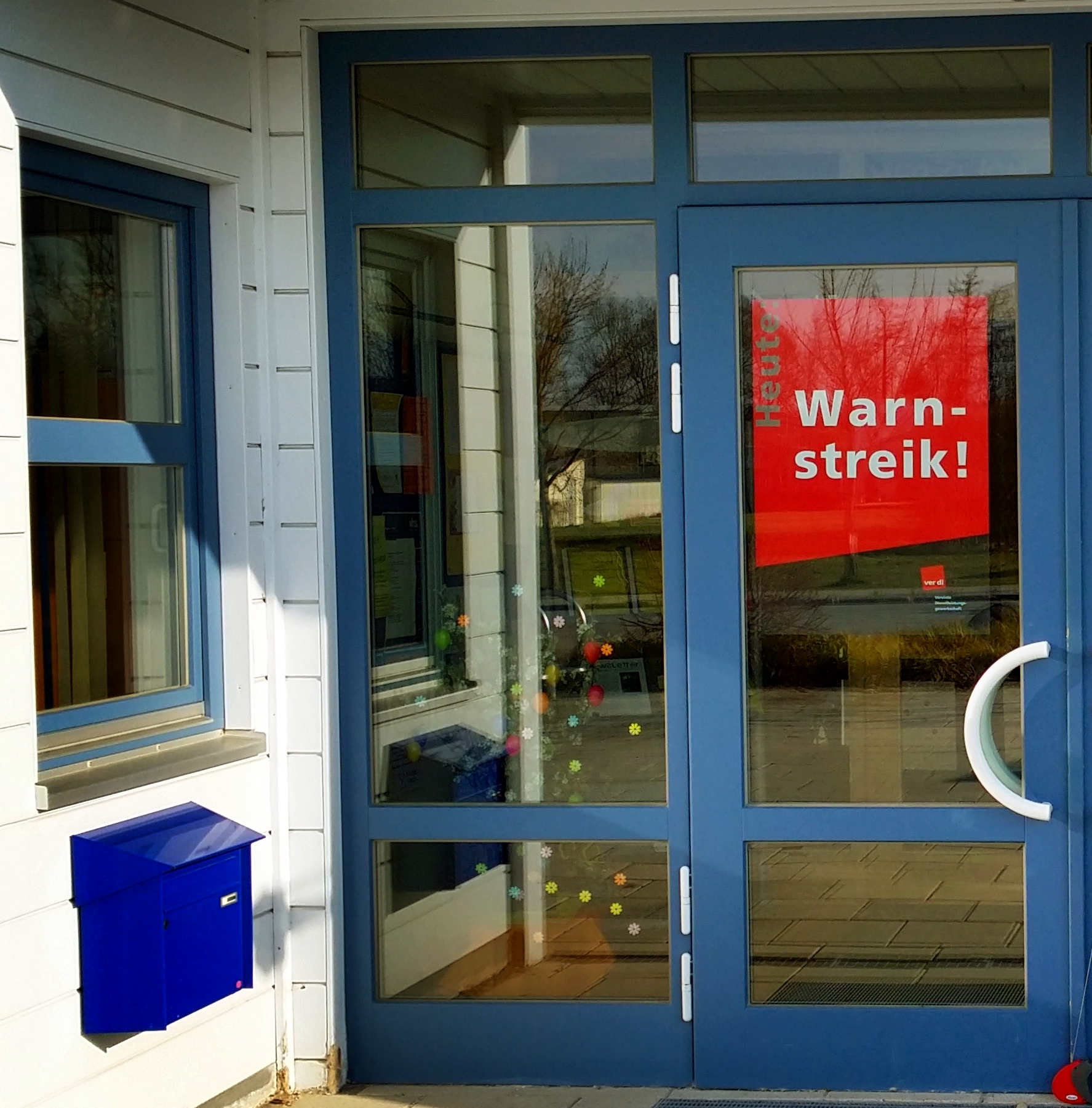 Infoplakat der Gewerkschaft Ver.di an der Eingangstüre eines Kindergarten in der Gemeinde Olching im März 2014 über den aktuell stattfindenden Warnstreik